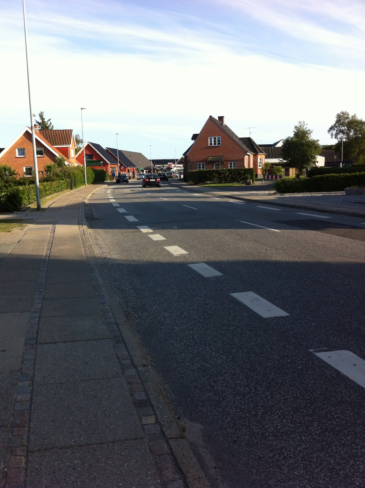 Kystvejen i Øster Hurup